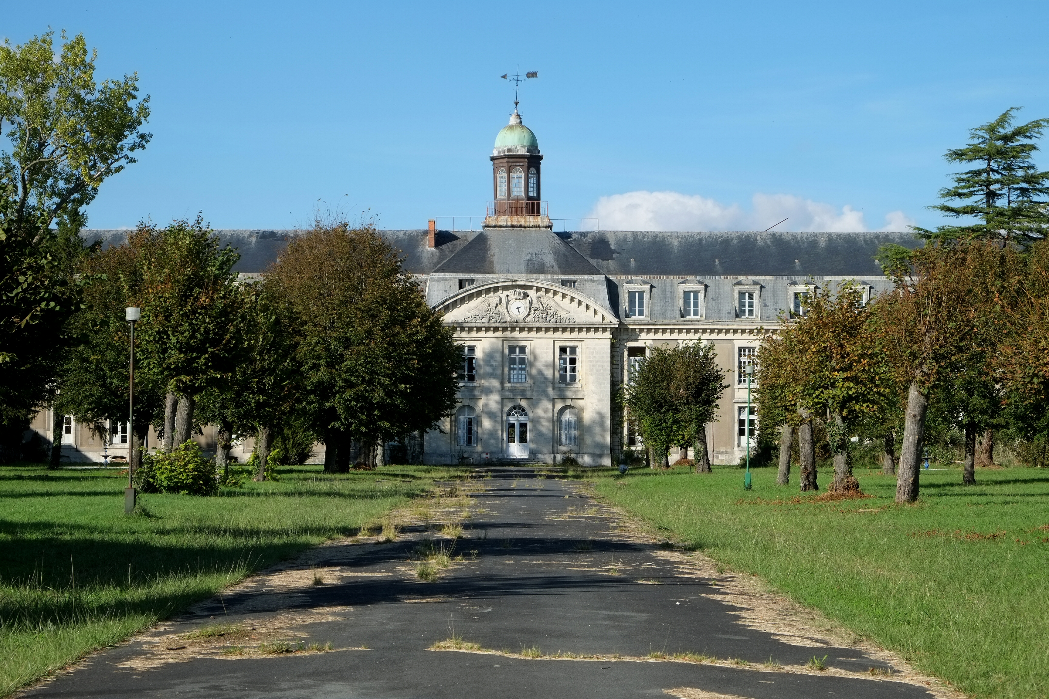 Hôpital de la Marine Rochefort Charente-Maritime France